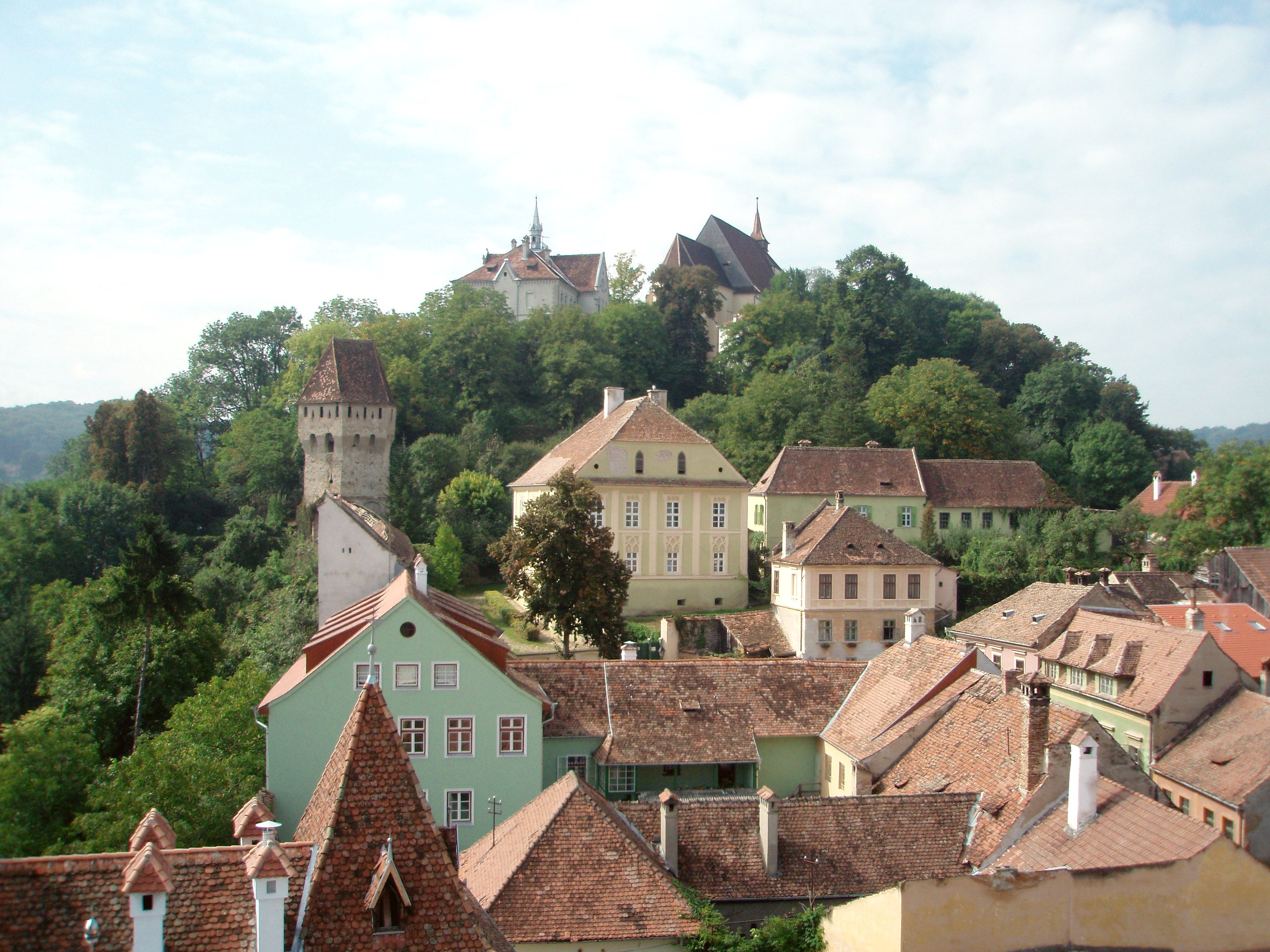 Sighişoara widok z wieży zegarowej